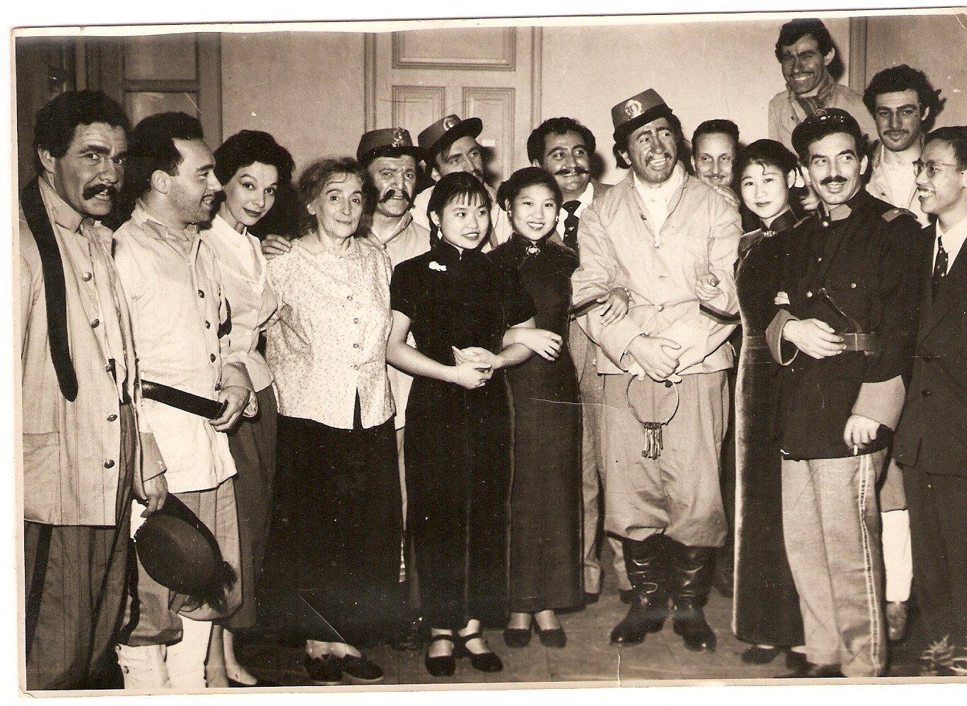 La Ópera de Pekín visita a la Comedia Nacional en el Teatro Nacional Cervantes en que se representa a Juan de Dios milico y paisano, Miguel Narciso Bruse con Milagros de la Vega, Violeta Antier y Marcelo Krass